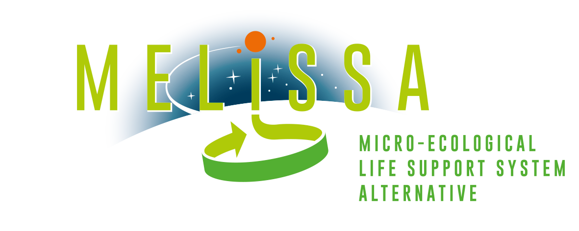 Logo